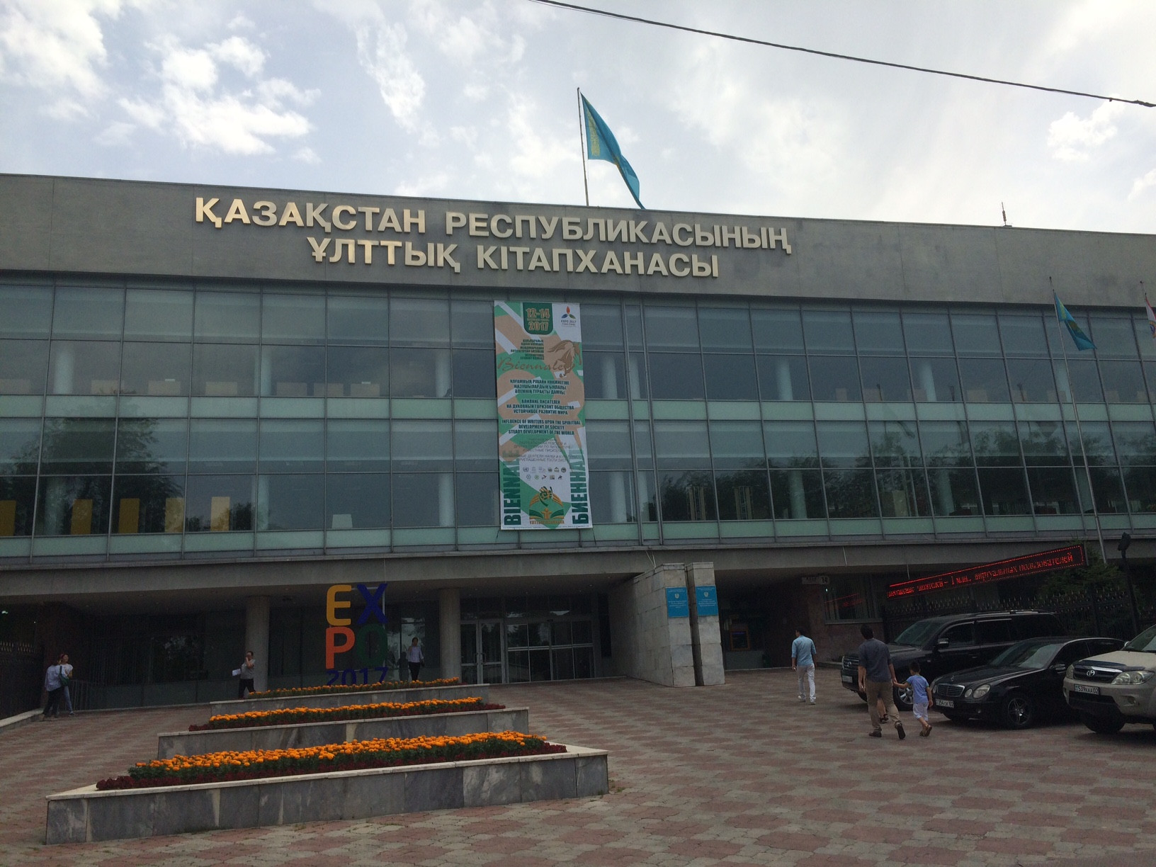 Национальная библиотека Республики Казахстан в Алматы